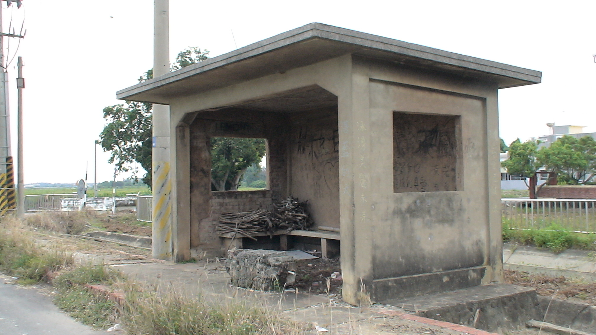 Fu-an Station, Houbi, Tainan, Taiwan 烏樹林線福安站